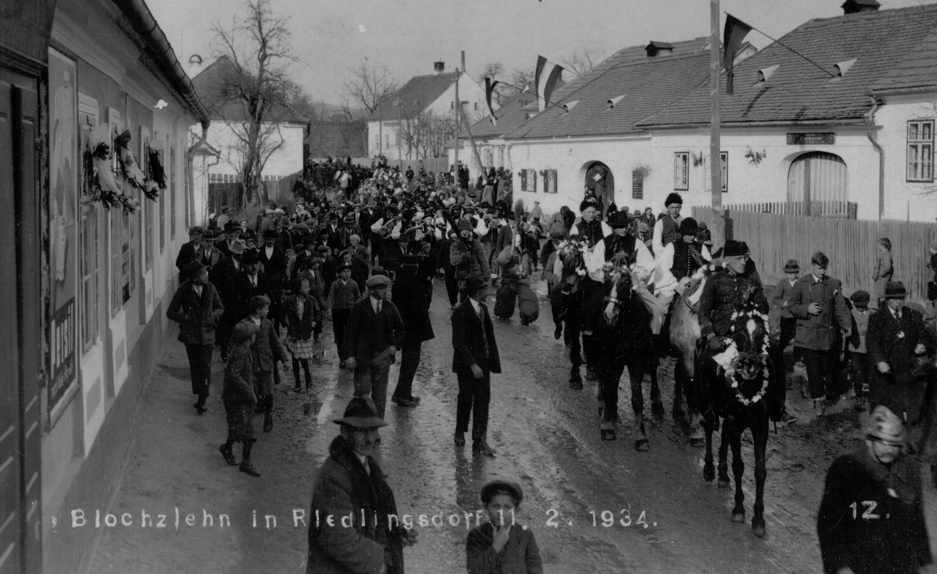 Blochziehen in Riedlingsdorf am 11. Februar 1934. Am nächsten Tag brach der Österreichische Bürgerkrieg aus.